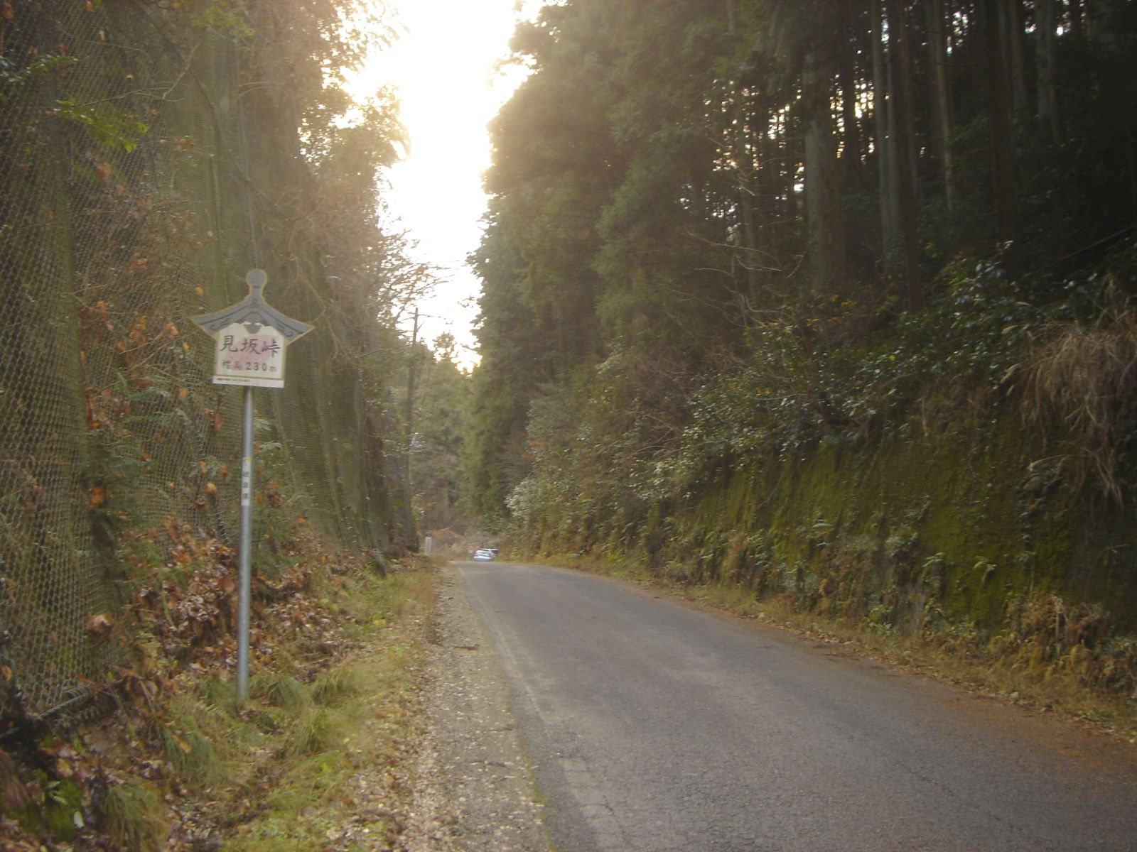 Misaka Touge(見坂峠、岐阜県道80号美濃川辺線）,岐阜県美濃市、関市の市境で撮影。